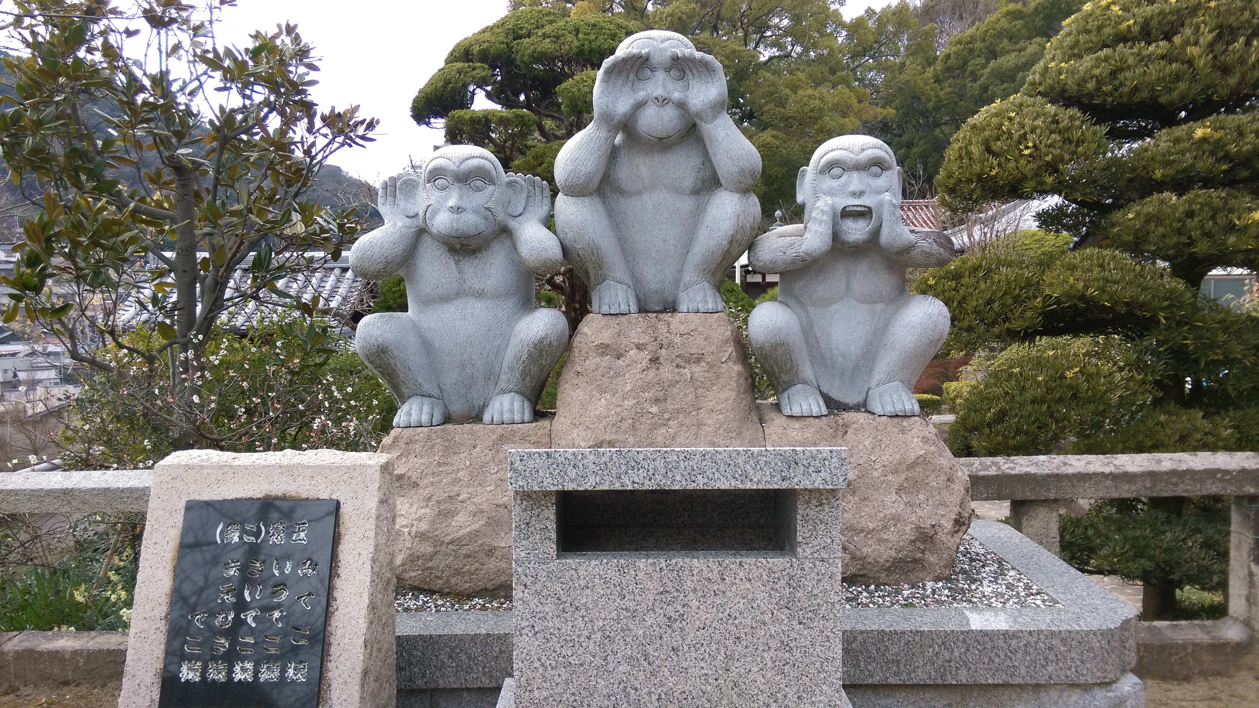 広島県尾道大山寺の三猿像の写真